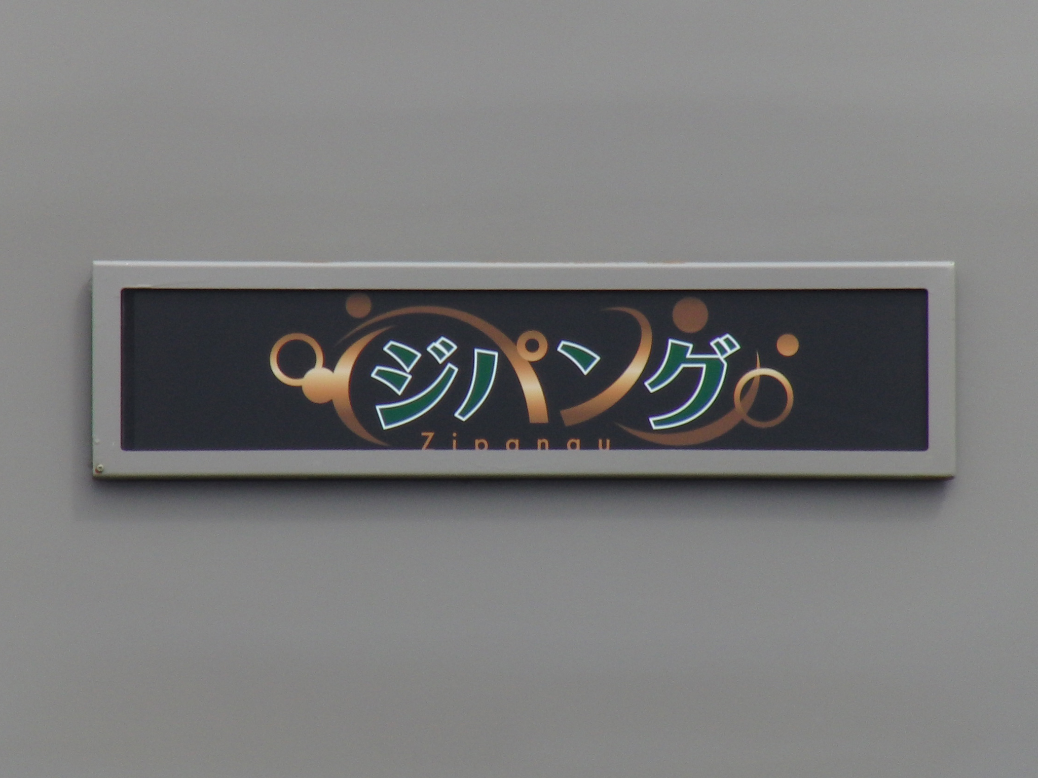 485系電車ジョイフルトレイン ジパング サイドボード